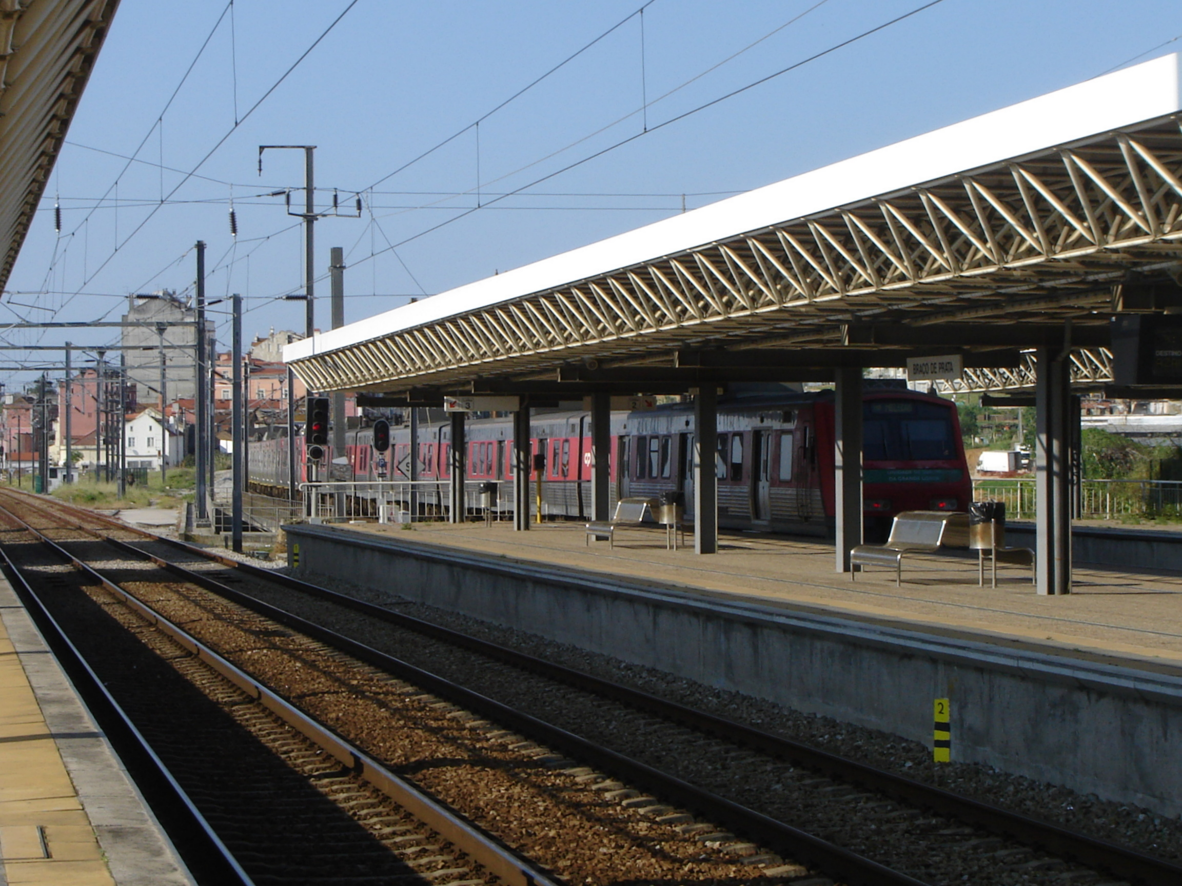 Vista para as plataformas da Estação ferroviária de Braço de Prata